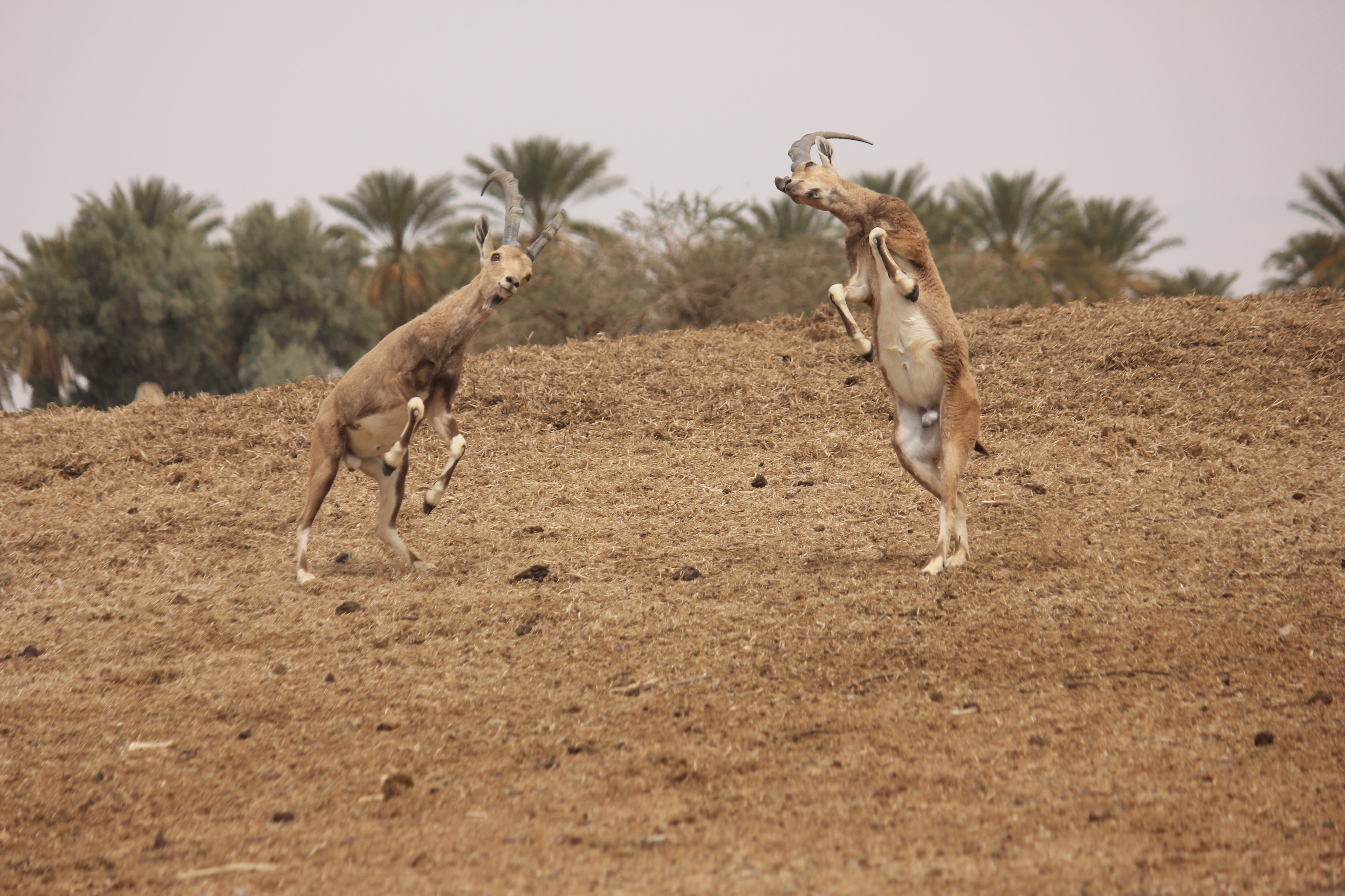 שני יעלים נלחמים זה בזה במהלך האביב